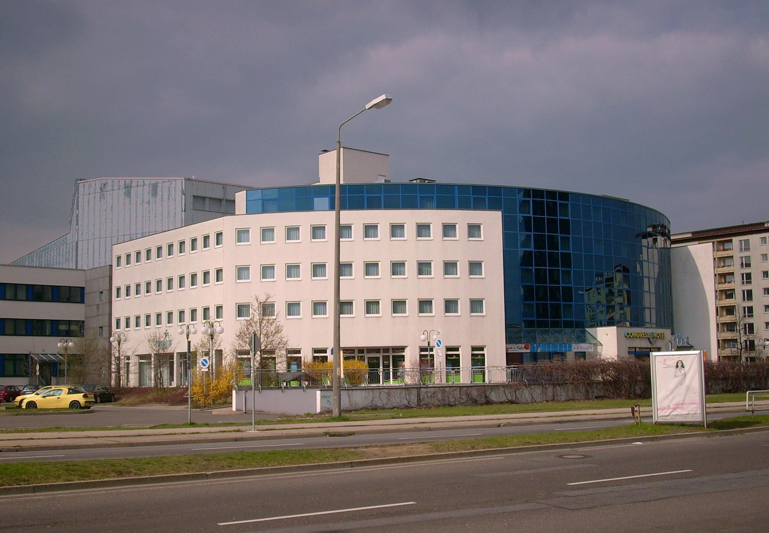 Congress Hotel, Dr.-Wilhelm-Külz-Straße in Hoyerswerda